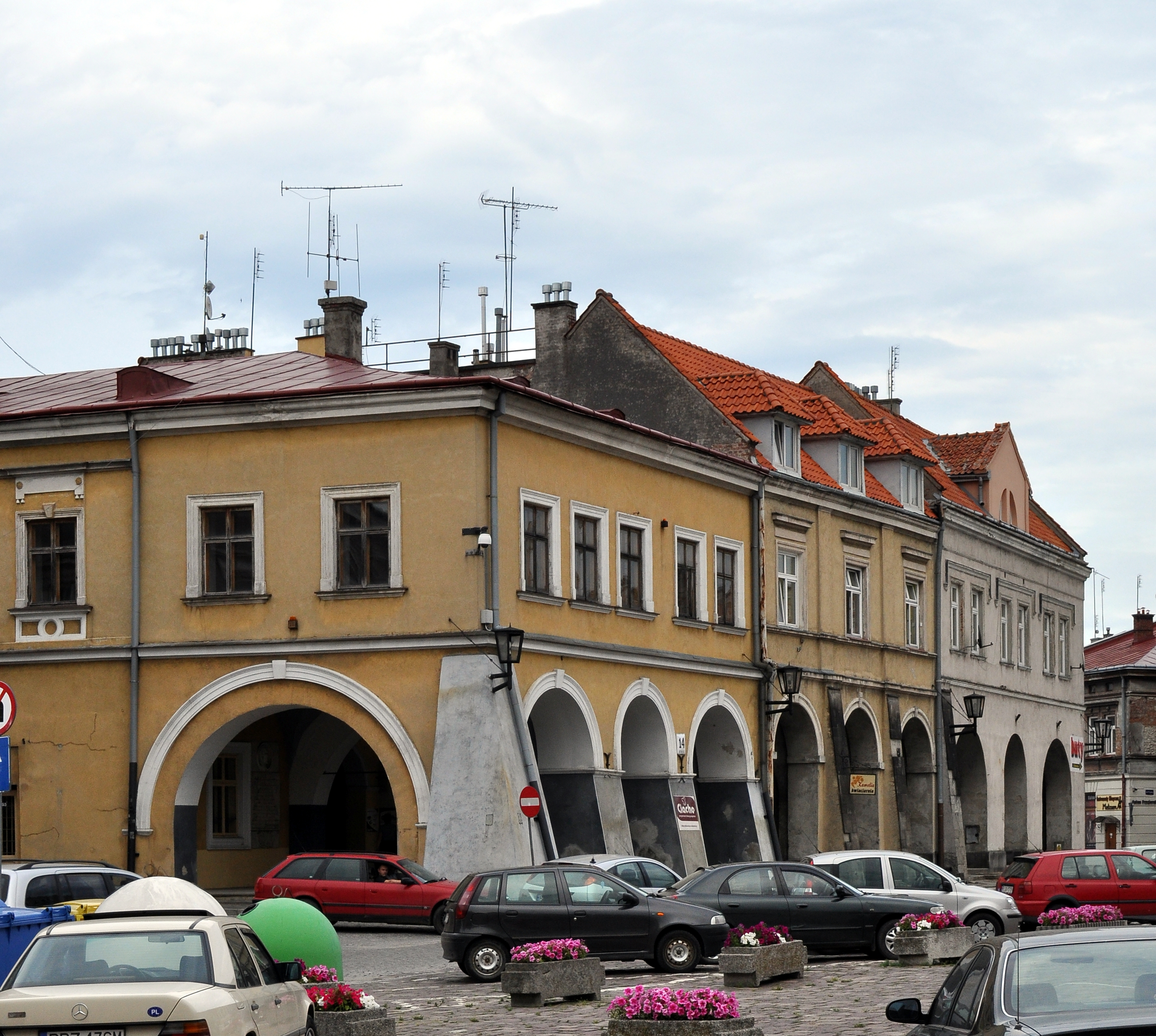 arosław kamienice Rynek 12, 13, 14 (pierwsza od lewej) 01.1992, A-441 z 16.08.1991, A-439 z 16.08.1991.